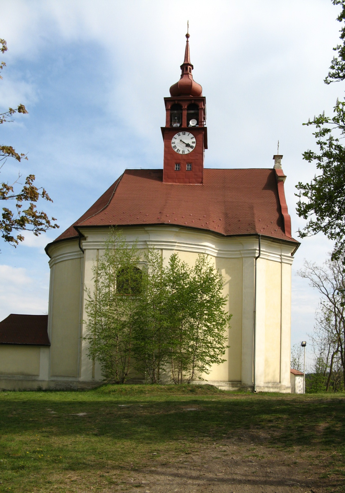 Kostel Andělů Strážných s křížovou cestou (Stražisko), Stražisko